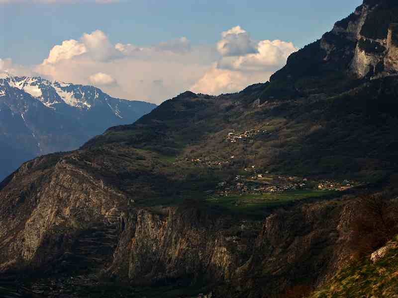 Village, composé de 3 hameaux et lacets de Montvernier